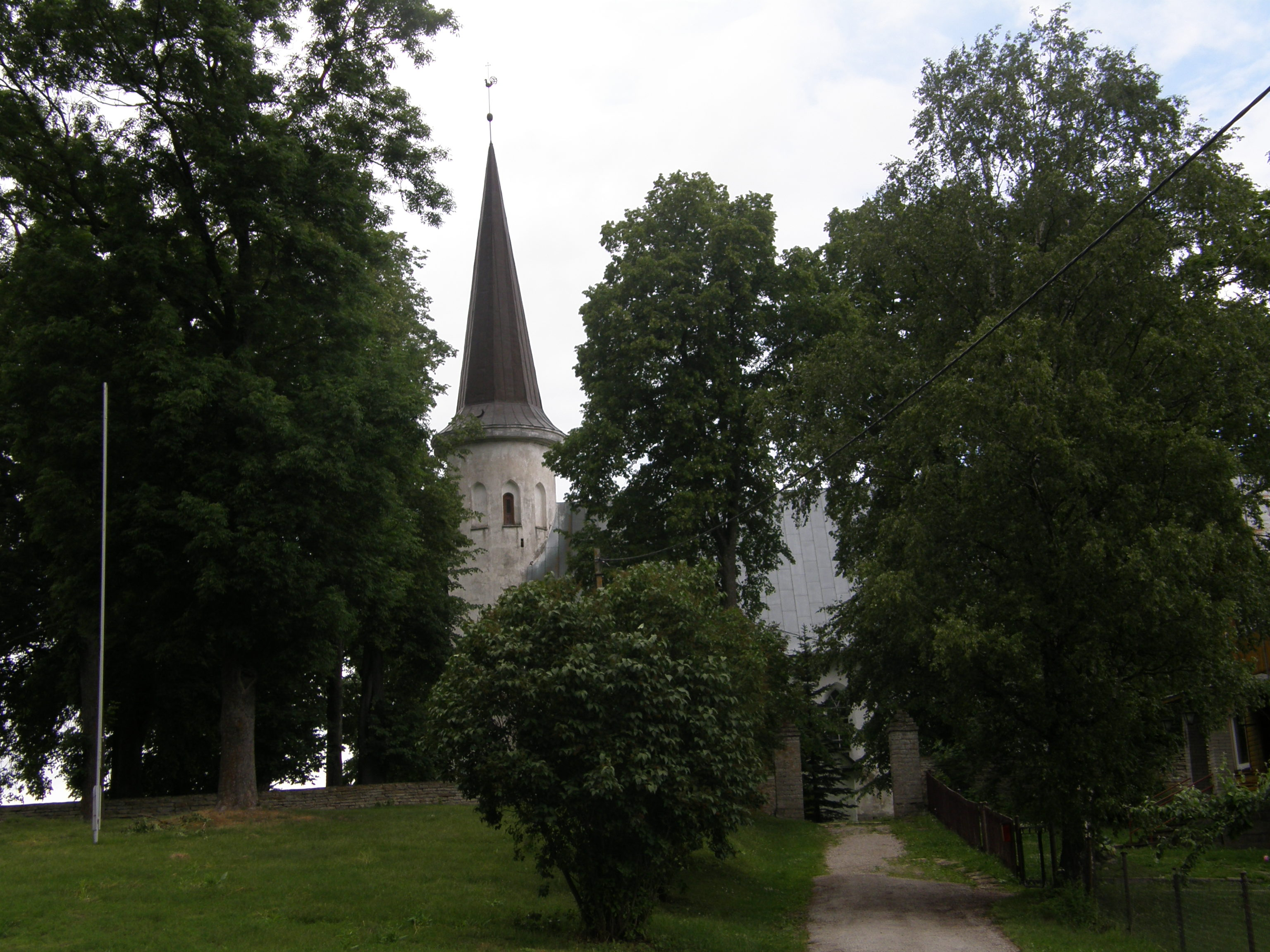 Lüganuse kirik